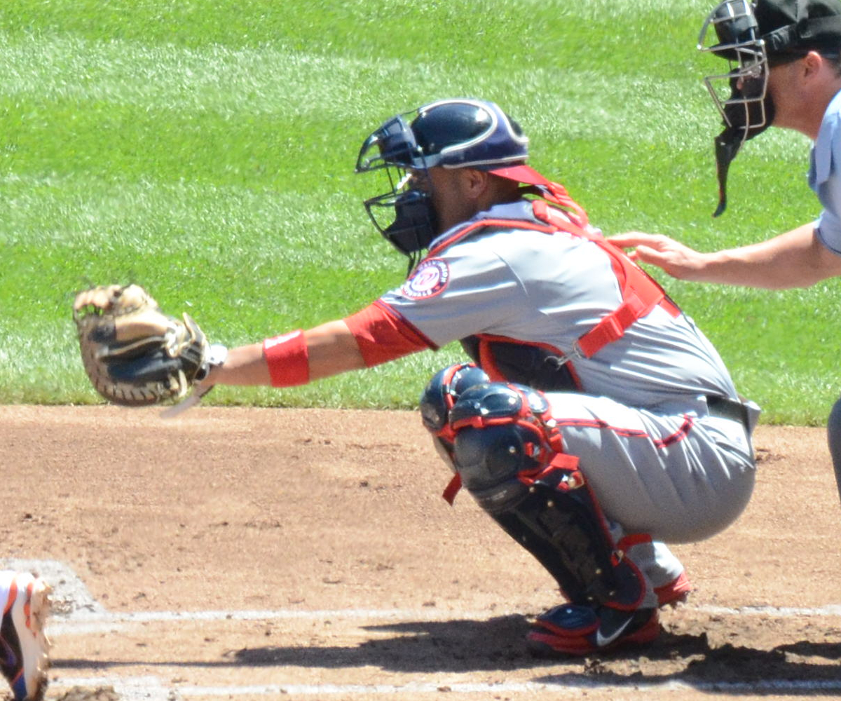 Sandy León